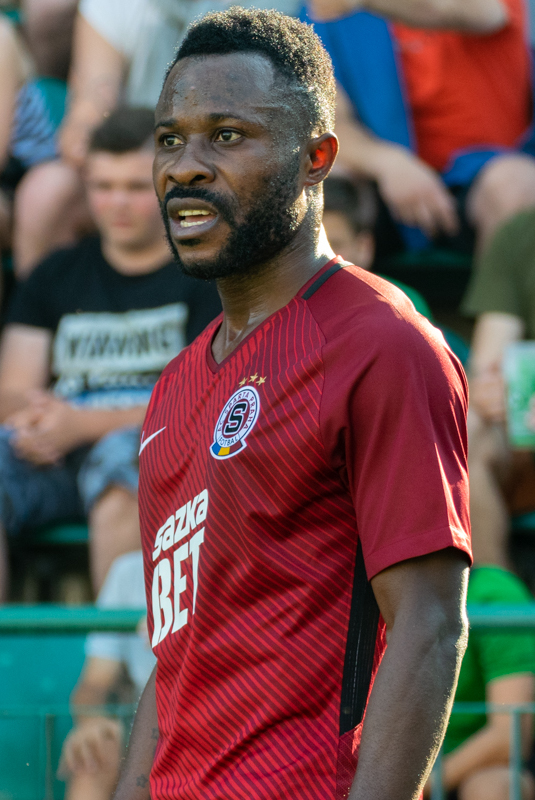 Guélor Kanga vs Bohemians Praha 1905